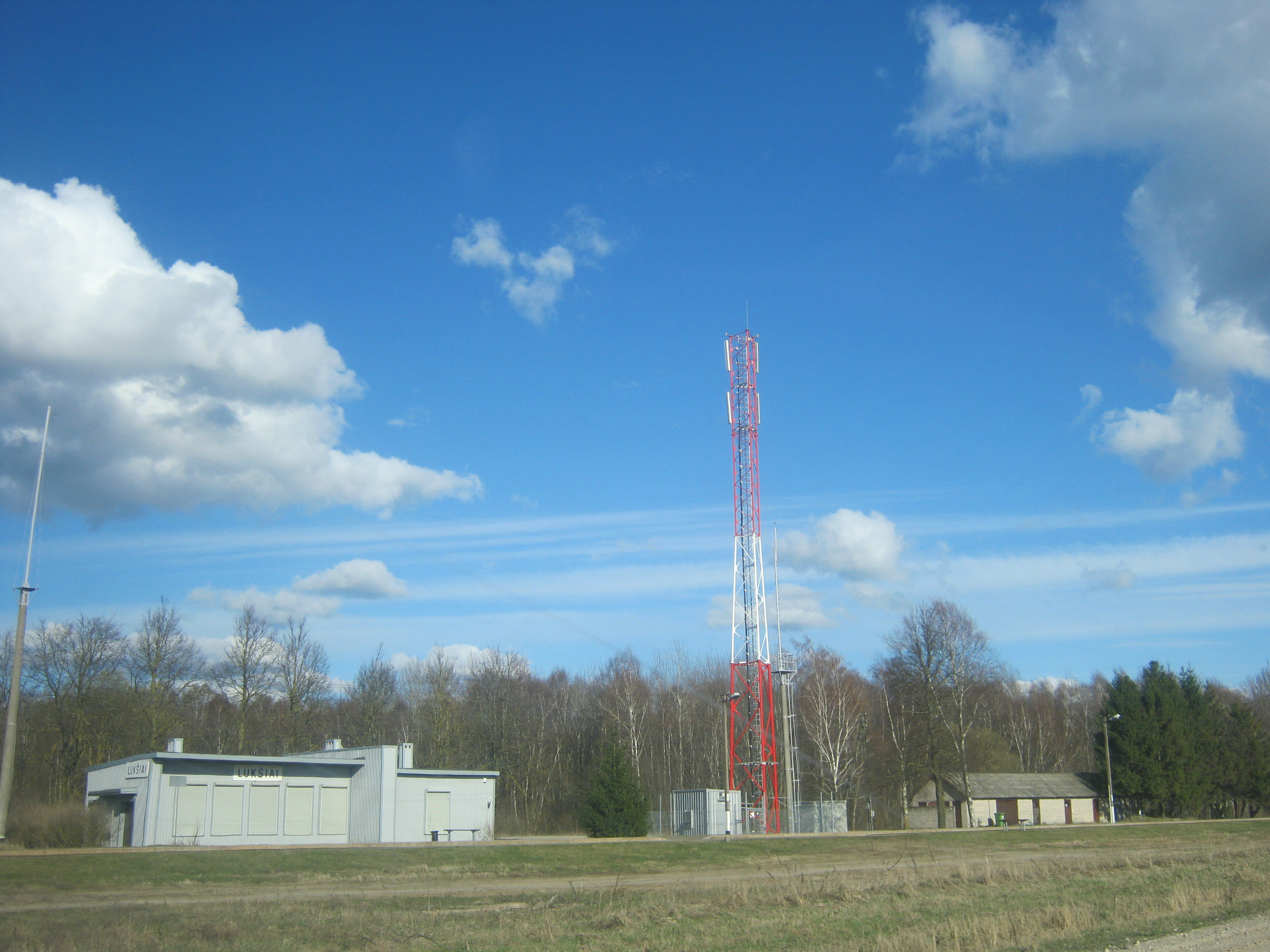 Slikių geležinkelio stotis